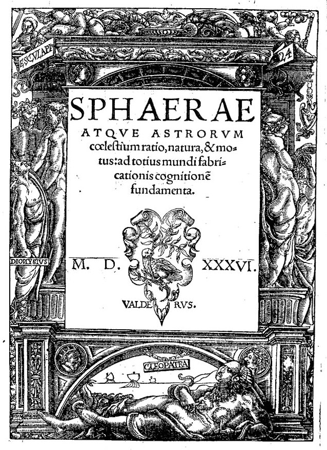 Sphaerae atque astrorum coelestium ratio, natura, & motus: ad totius mundi fabricationis cognitionem fundamenta. - Basilea : Johann Walder, 1536. - [16], 296 p. : ill. ; 4º. - Contiene come elencato nel v. del front.: Iacobus Zieglerus ... De solidae sphaerae constructione. Proclus Diadochus Lycius De sphaera, siue globo coelesti, scholijs eiusdem Ziegleri explicatus. De canonica per sphaeram operatione. Hemicyclium Berosi. Aratus Solensis De siderum natura & motu, simul in eundem cum commentarijs Theonis Alexandrini ... Planisphaerium C. Ptolemaei, & Iordani .